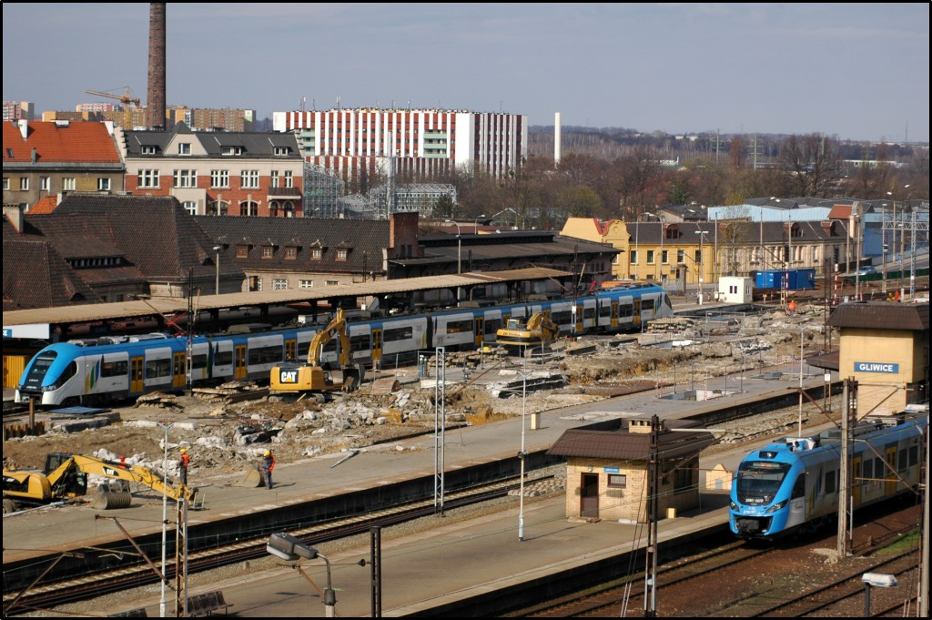 Stacja kolejowa Gliwice podczas remontu w marcu 2015 roku